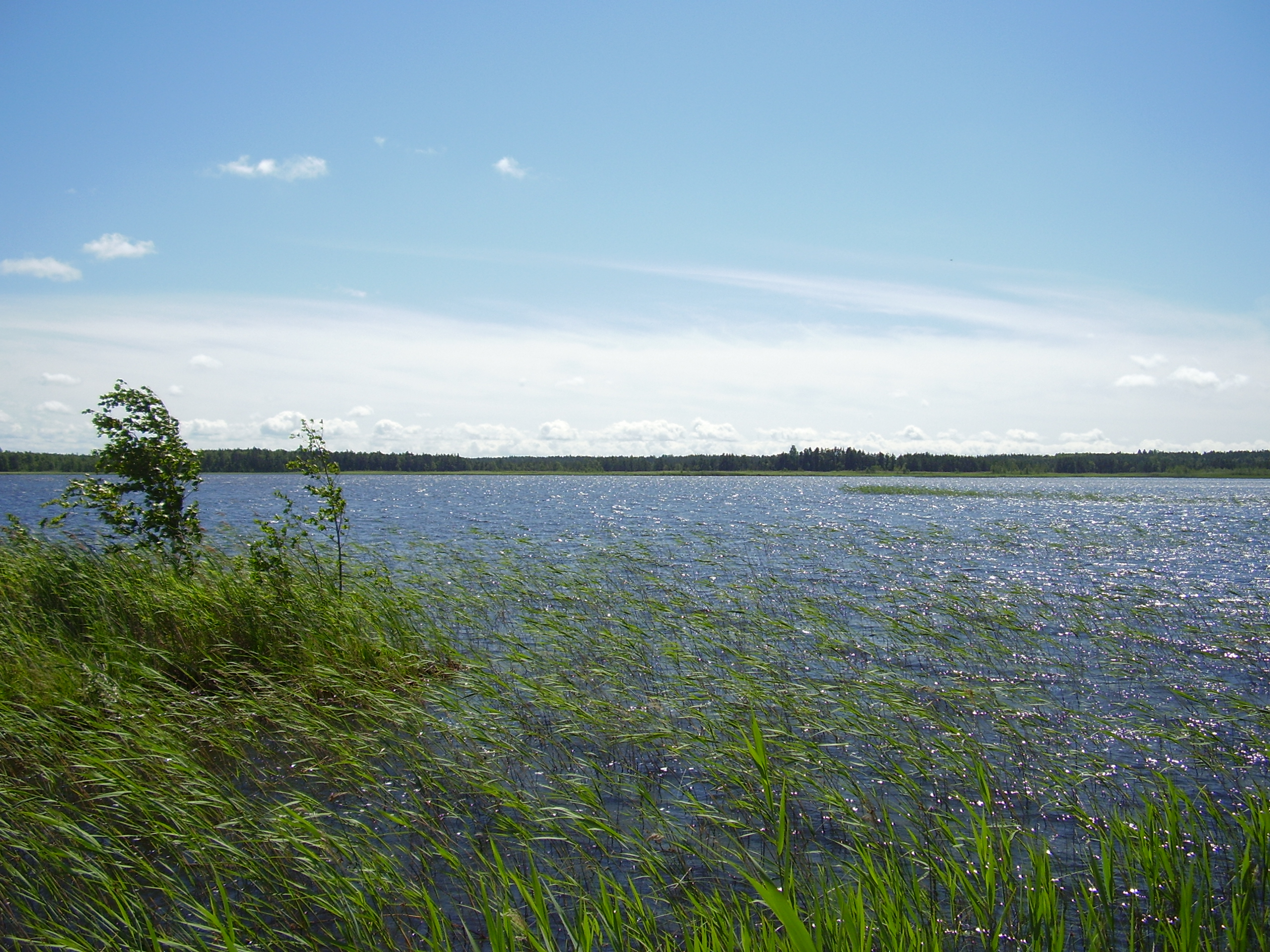 Vaade Veskijärve keskelt poolsaare tipust lõunasse